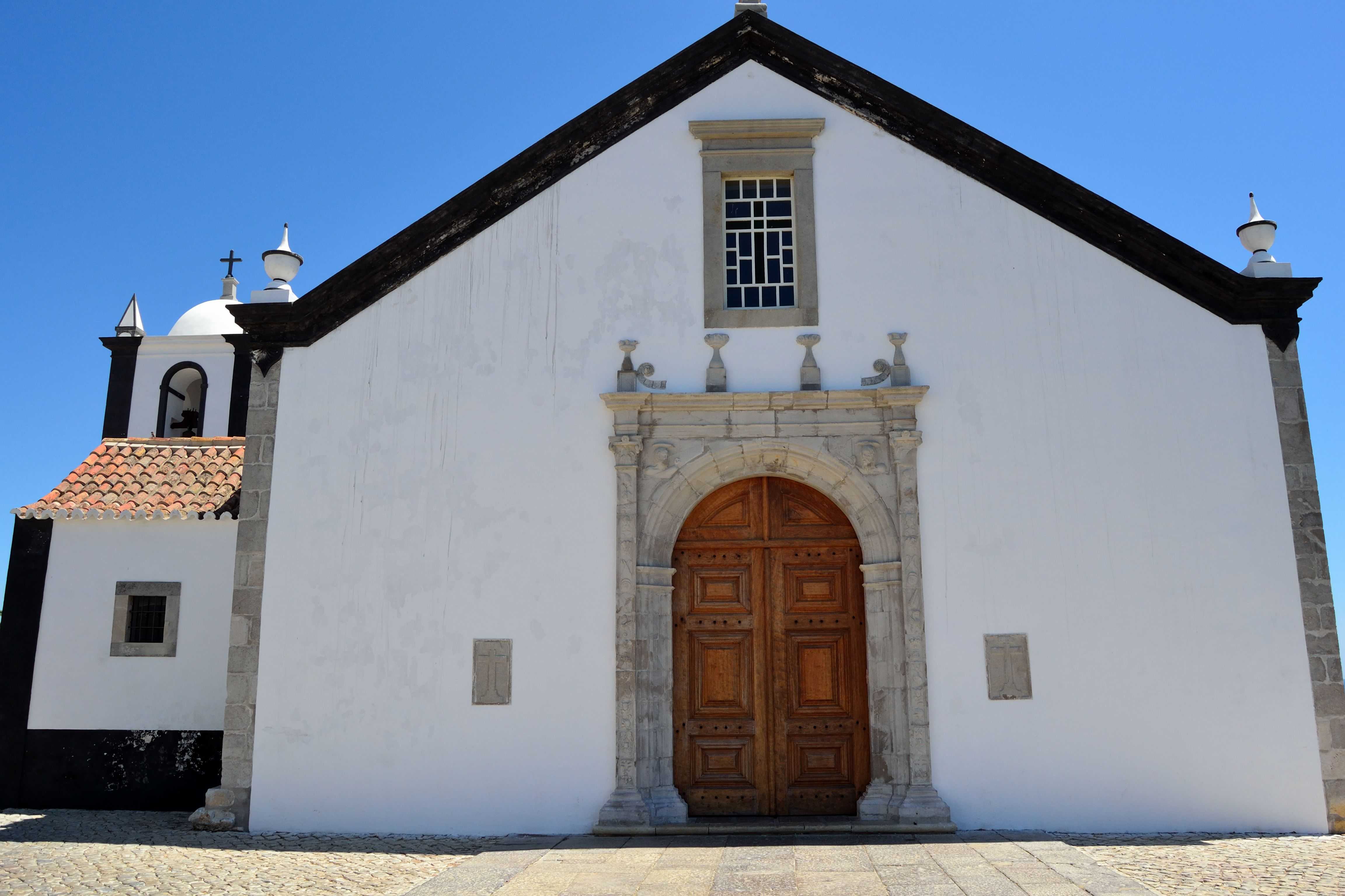 Cacela Velha, Ria Formosa, Algarve